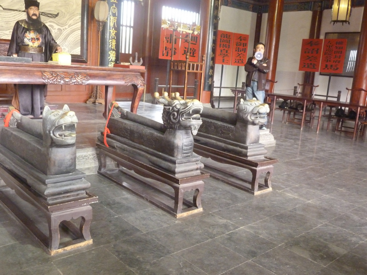 中文（中国大陆）: 开封包公祠